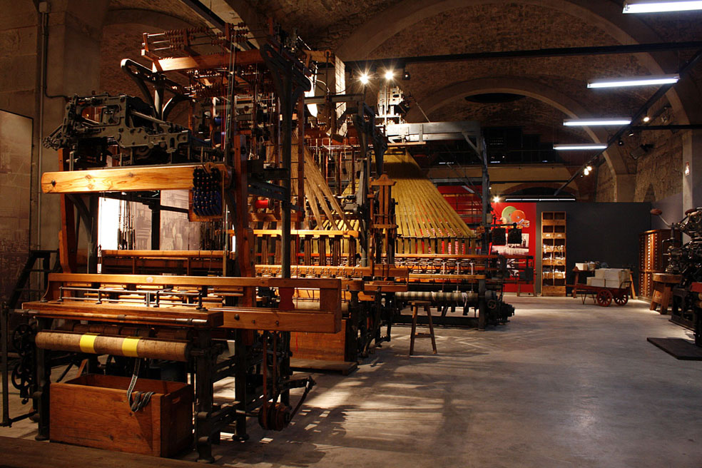 La Cinteria